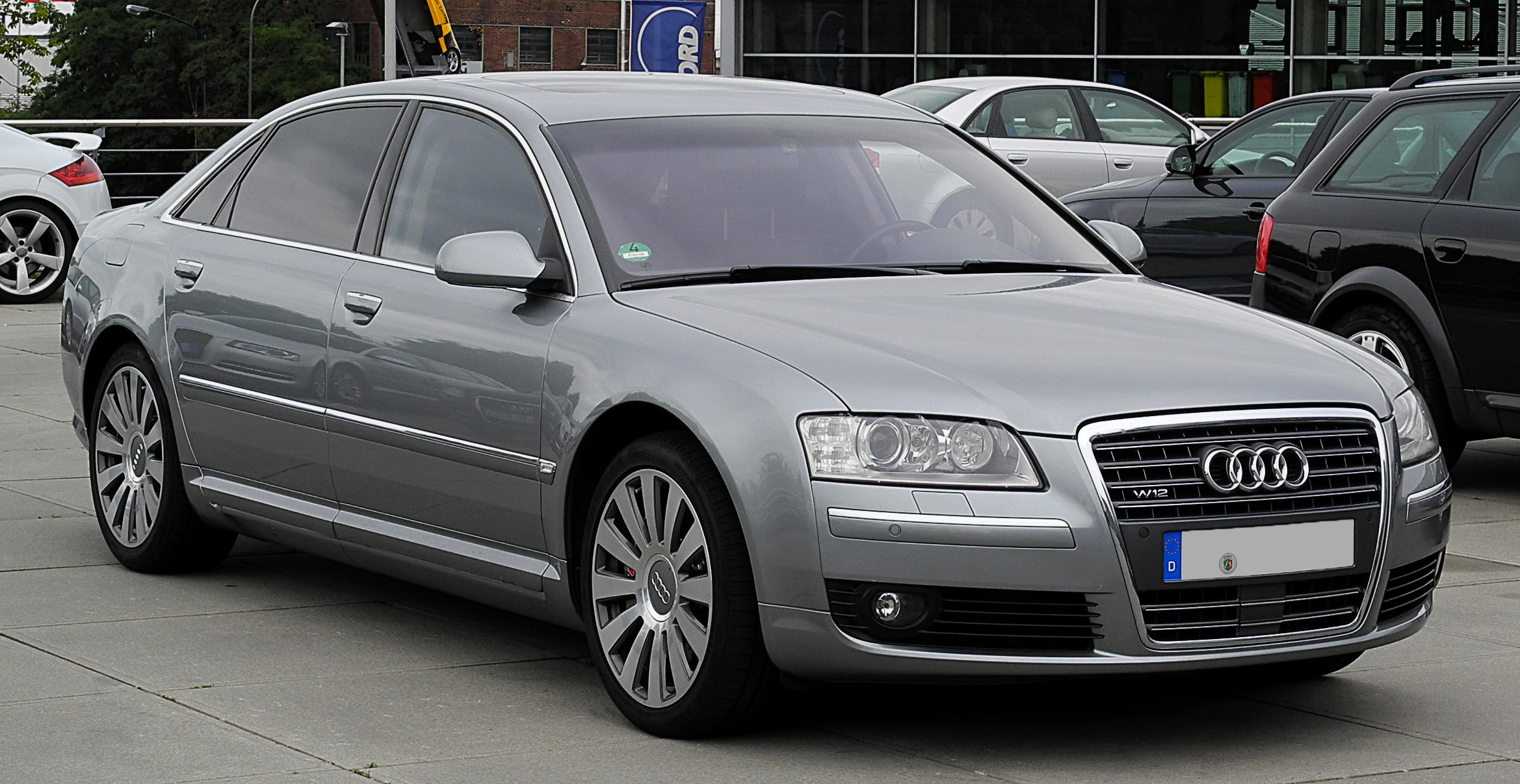 Audi A8 L W12 quattro (D3, 1. Facelift)